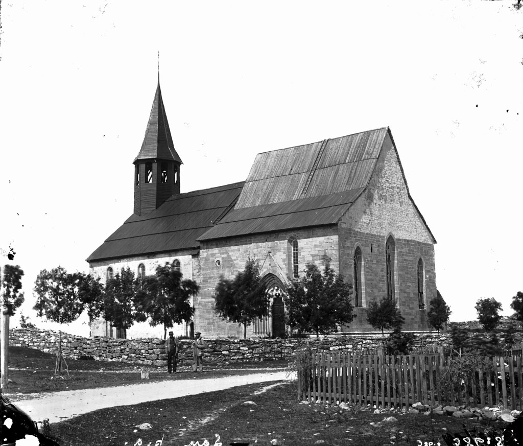 Kyrkan från sydöst.